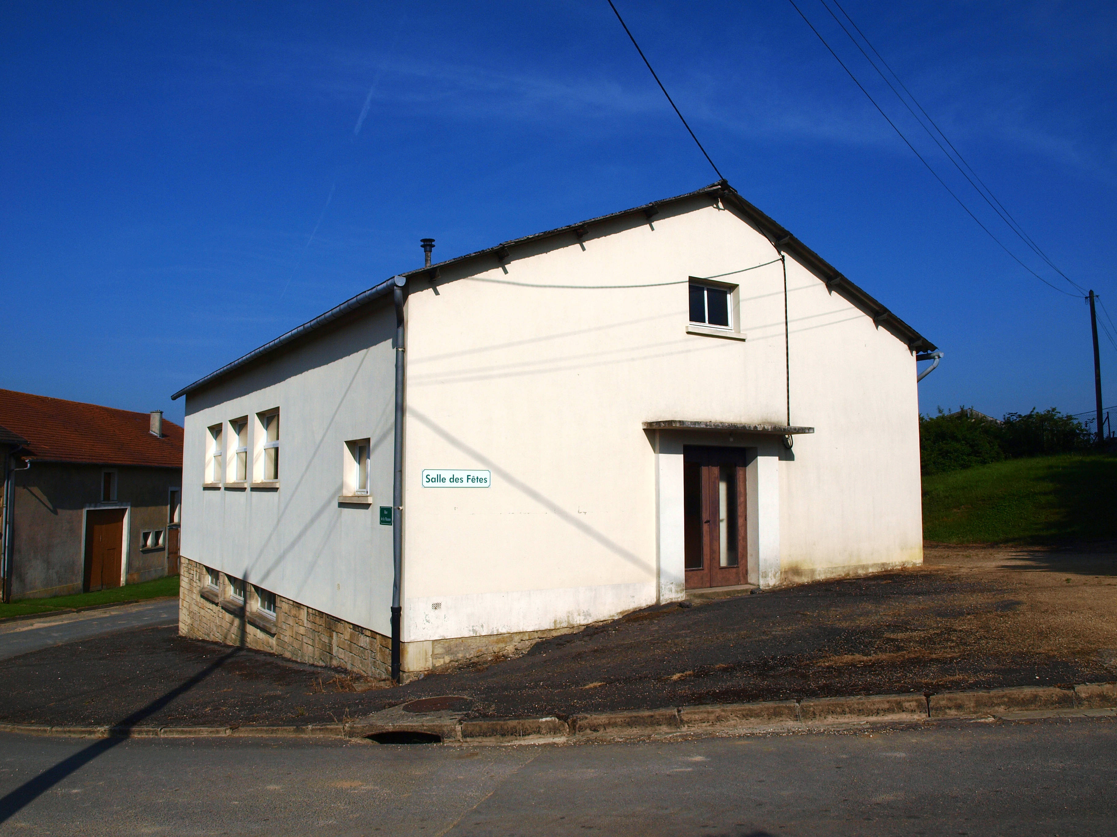 Oches (Ardennes, France) ; salle polyvalente